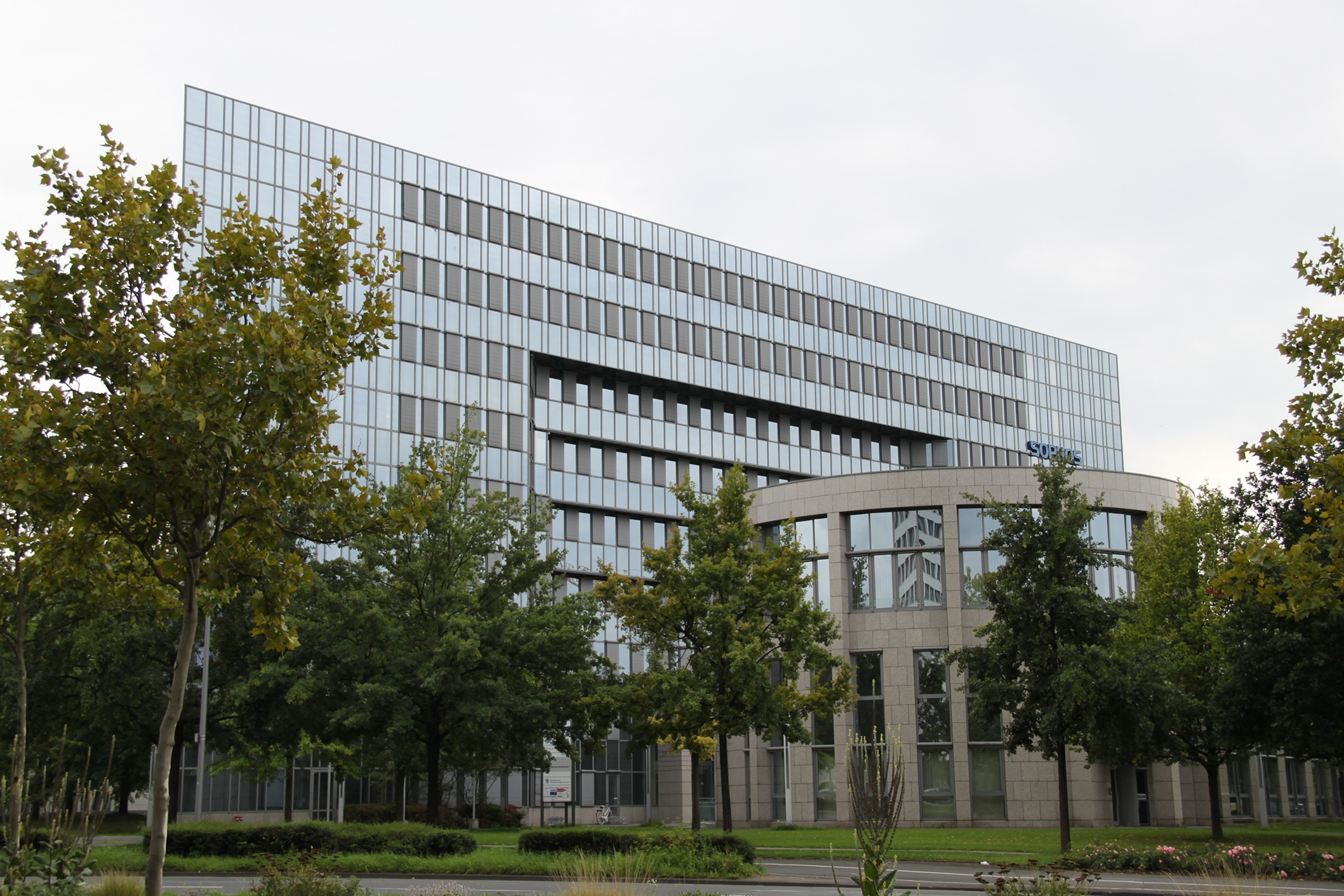 Gebäude von Sophos in Wiesbaden